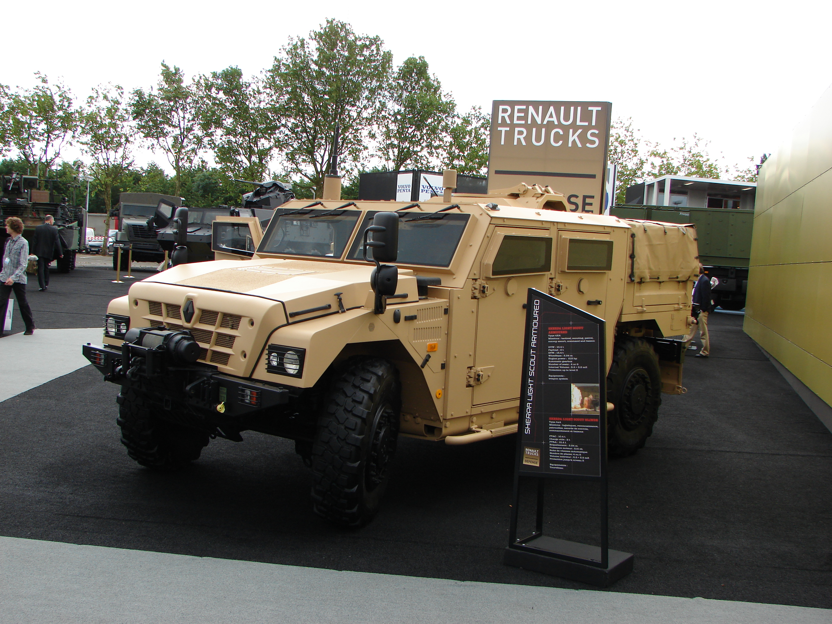 Renault Trucks Defense à Eurosatory 2012